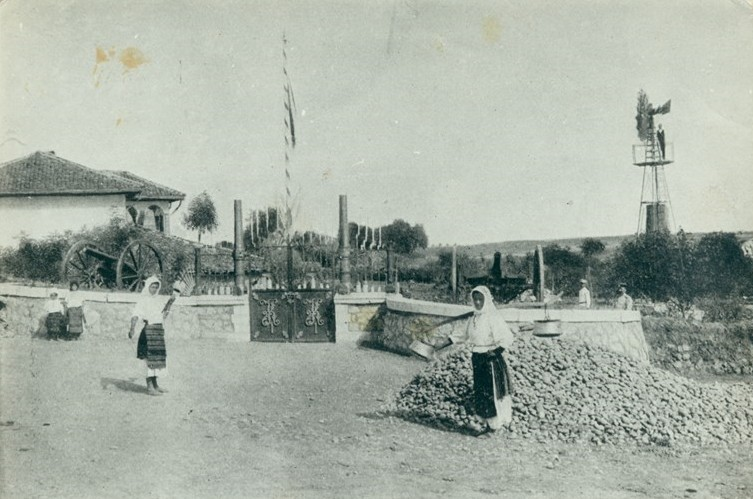 Снимка с външен изглед на музея „Карол I” в с. Пордим, Плевенско. Музеят е открит на 3 септеври 1907 г.